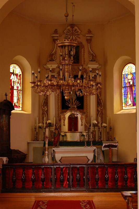 Lapiu bažnyčios altorius